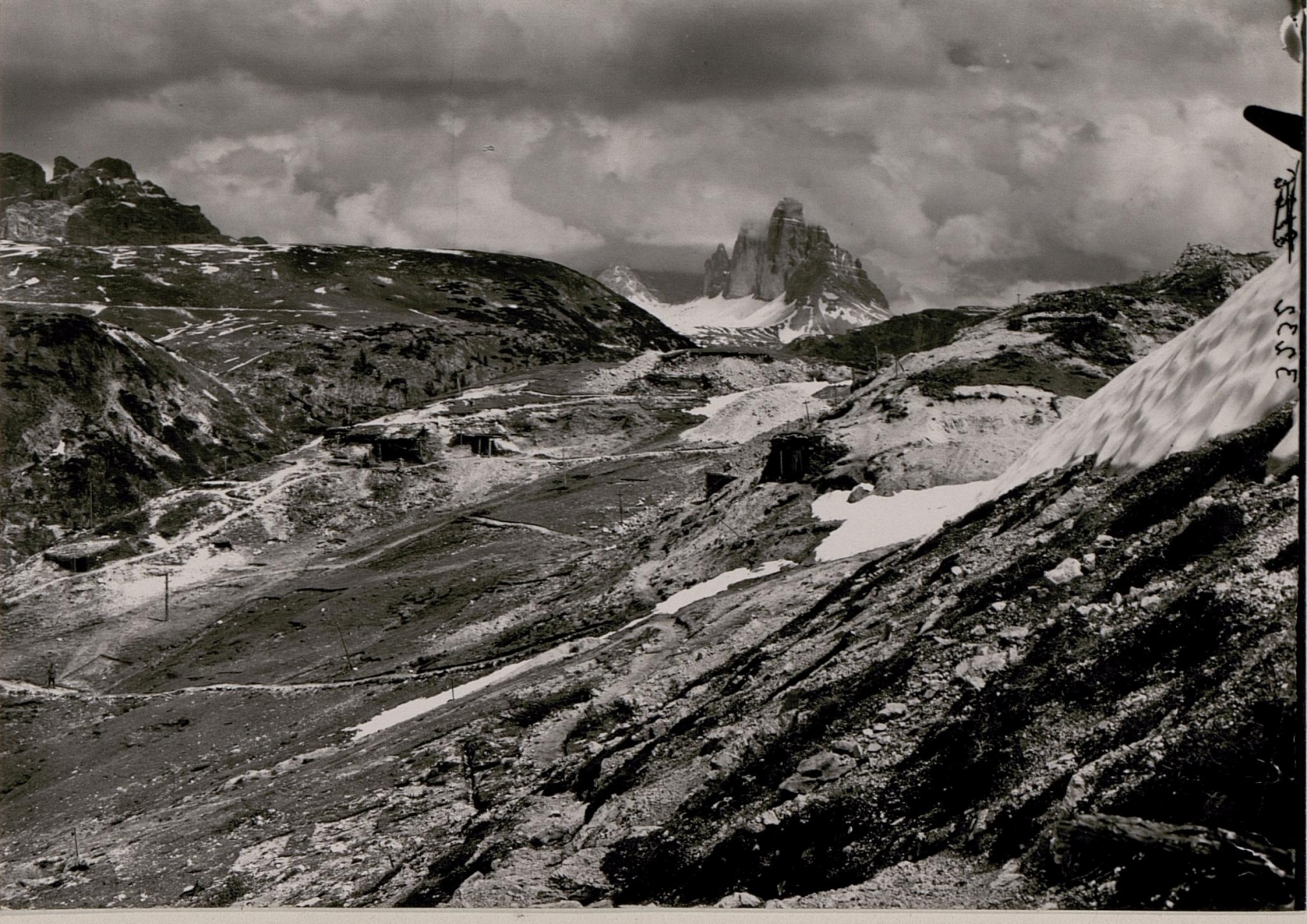 Standort: Plätzwiese. Drei Zinnen, Strudelkopf, Schwalbenkofel